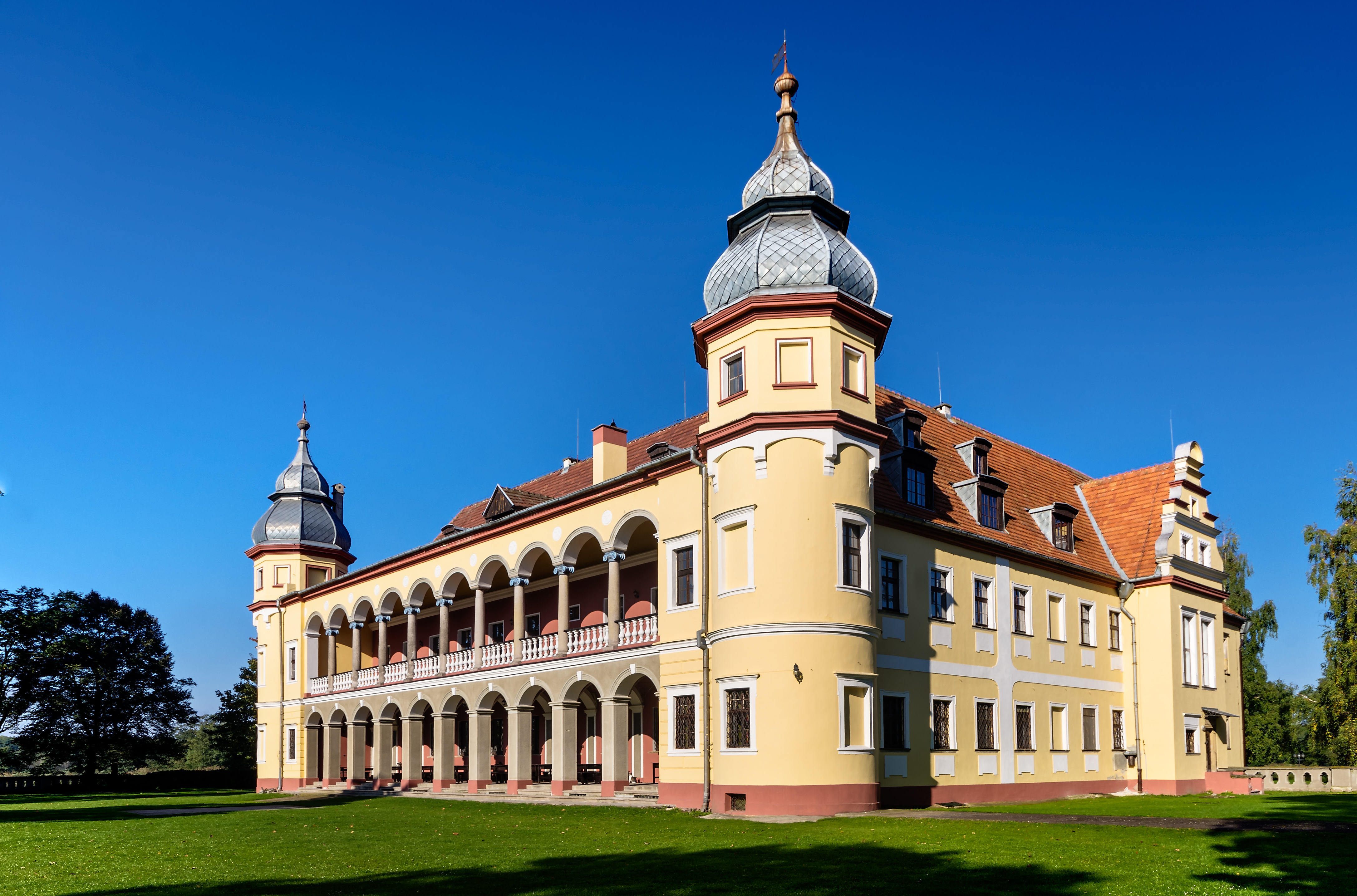 Krobielowice 21 - zamek, XVII, XIX